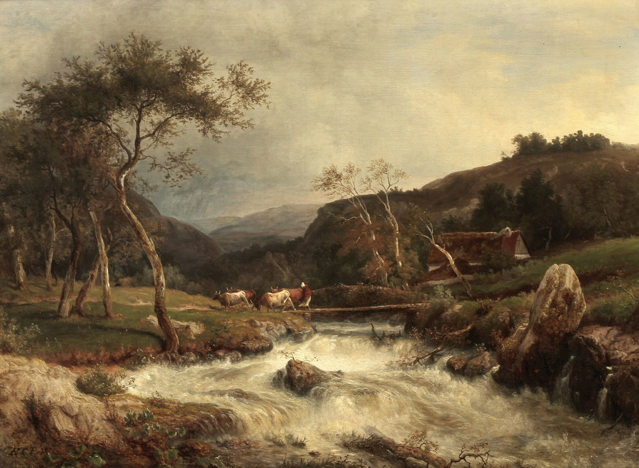 Am Wildbach. Öl auf Leinwand. 67 x 91,5 cm